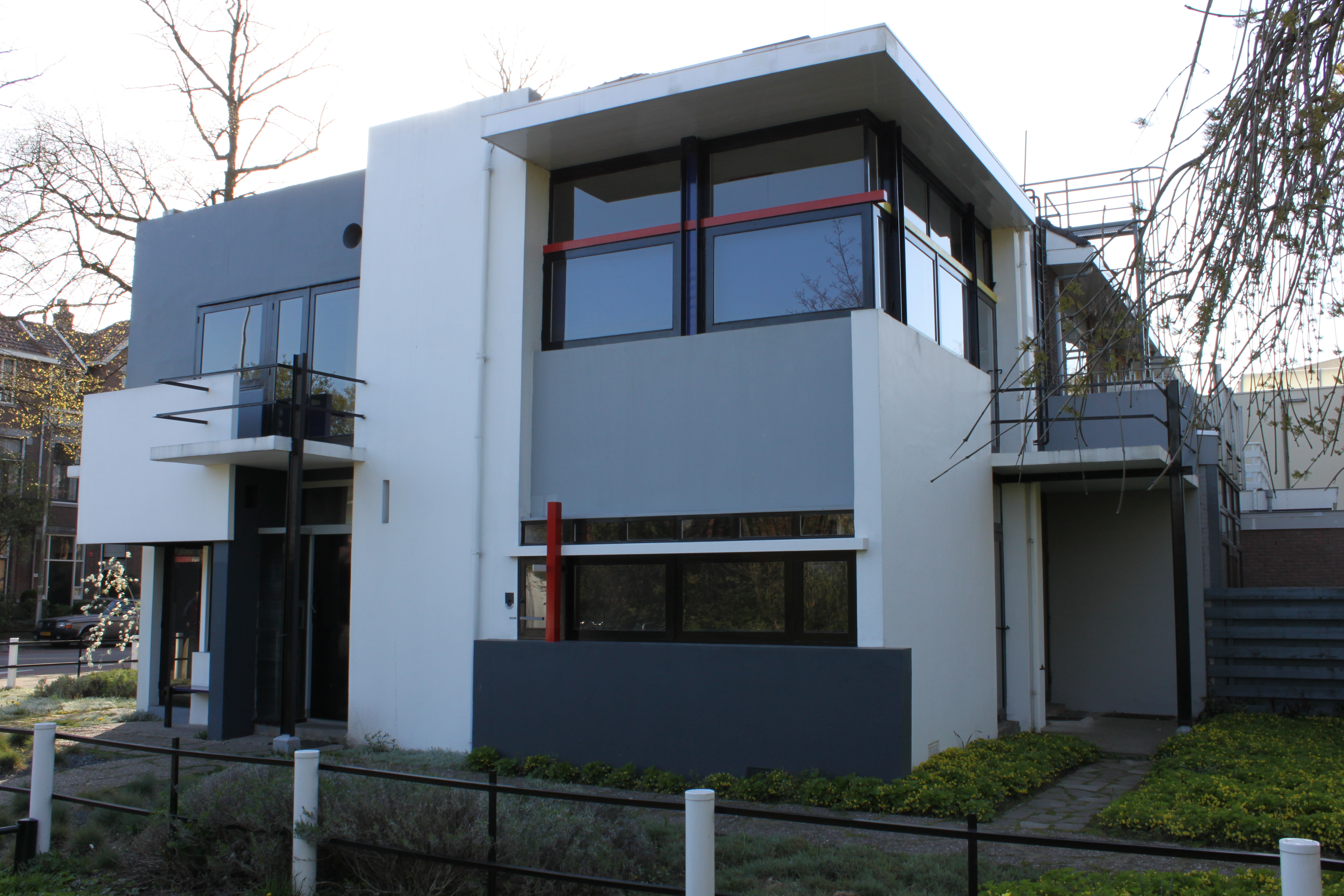 Het Rietveld-Schröderhuis in Utrecht